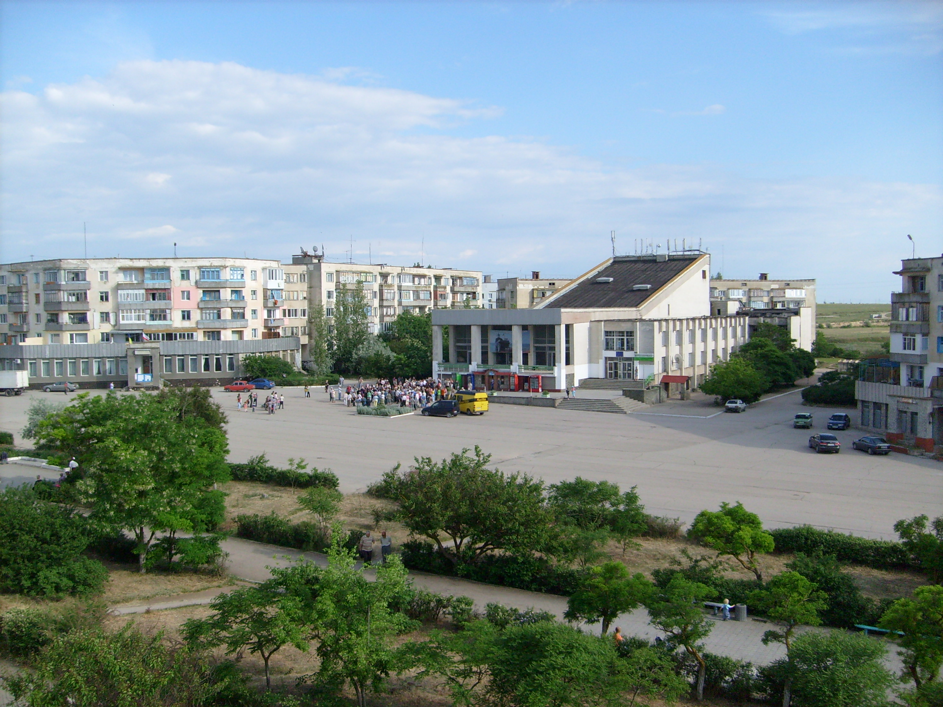 Новоозёрное